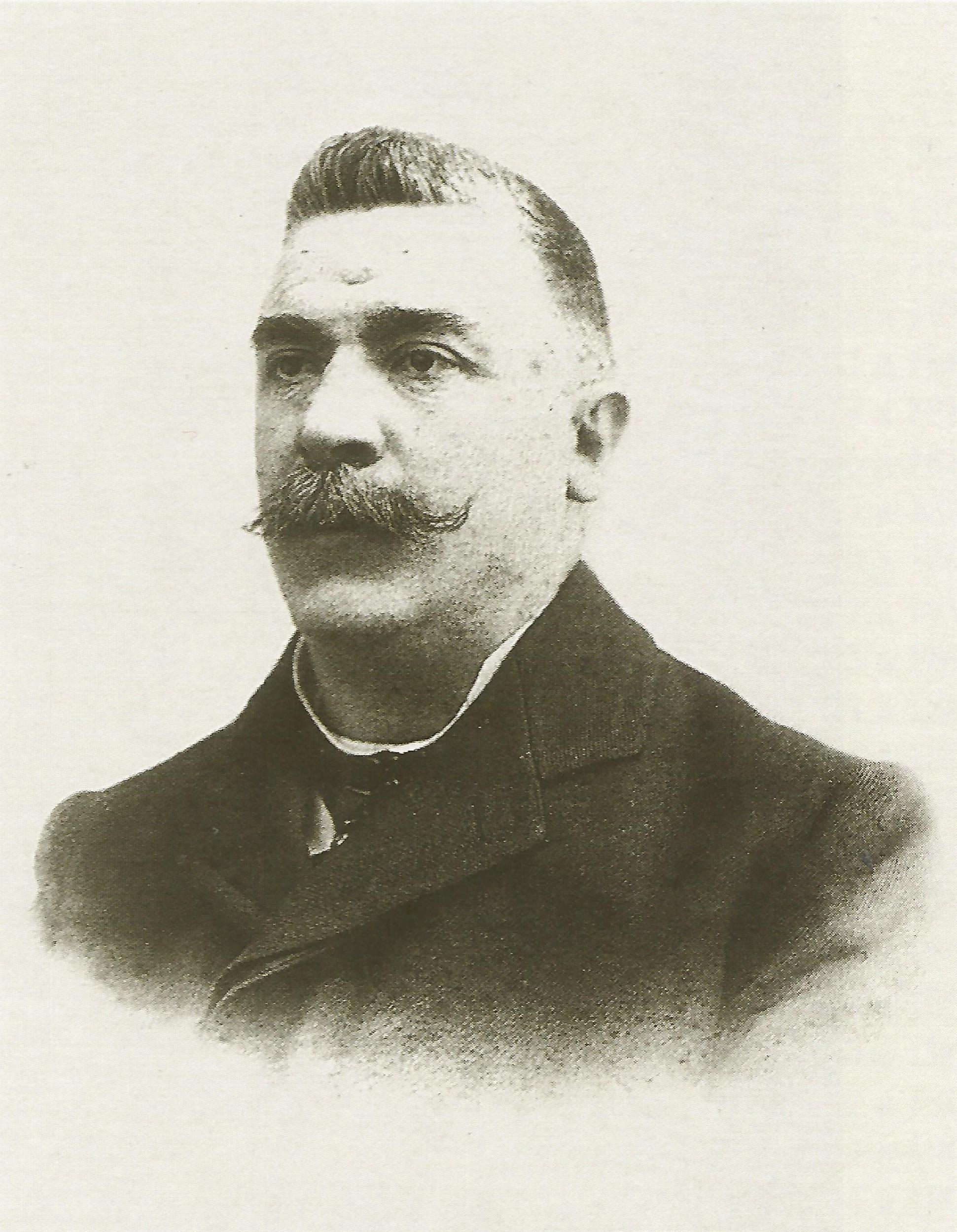 Joaquim Palay i Jaurés (1855-1928). Alcalde de Badalona entre 1894-95 i 1897-98.